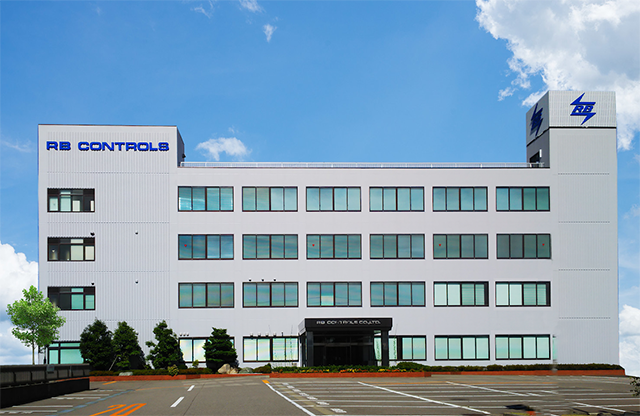 アール・ビー・コントロールズ株式会社 本社屋 2018年7月29日撮影